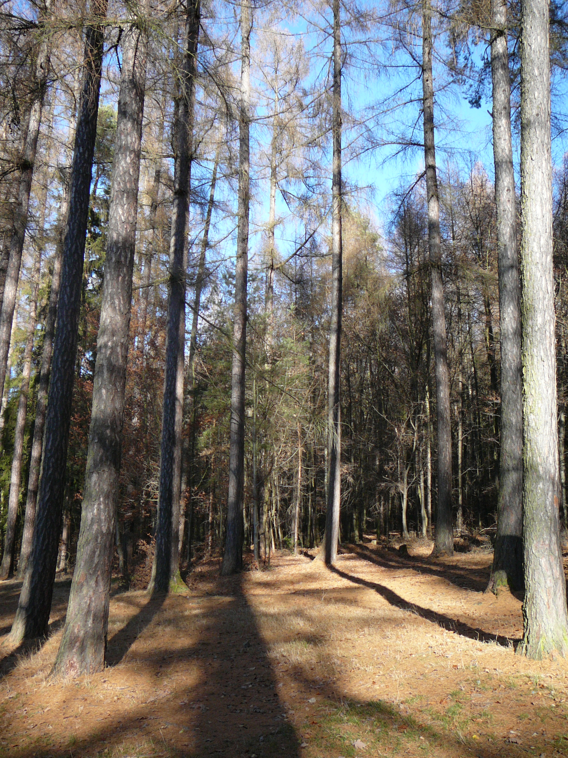 Smrková monokultura na úpatí kopce Velký Blaník vysázená po kalamitě na začátku 20.stol.